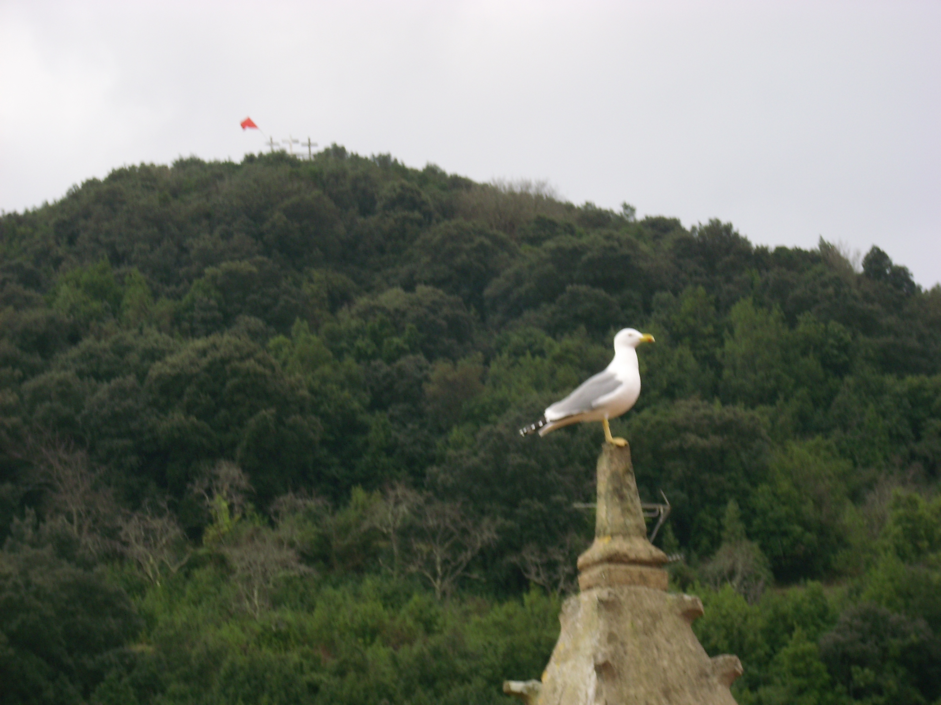 A vista de pájaro.